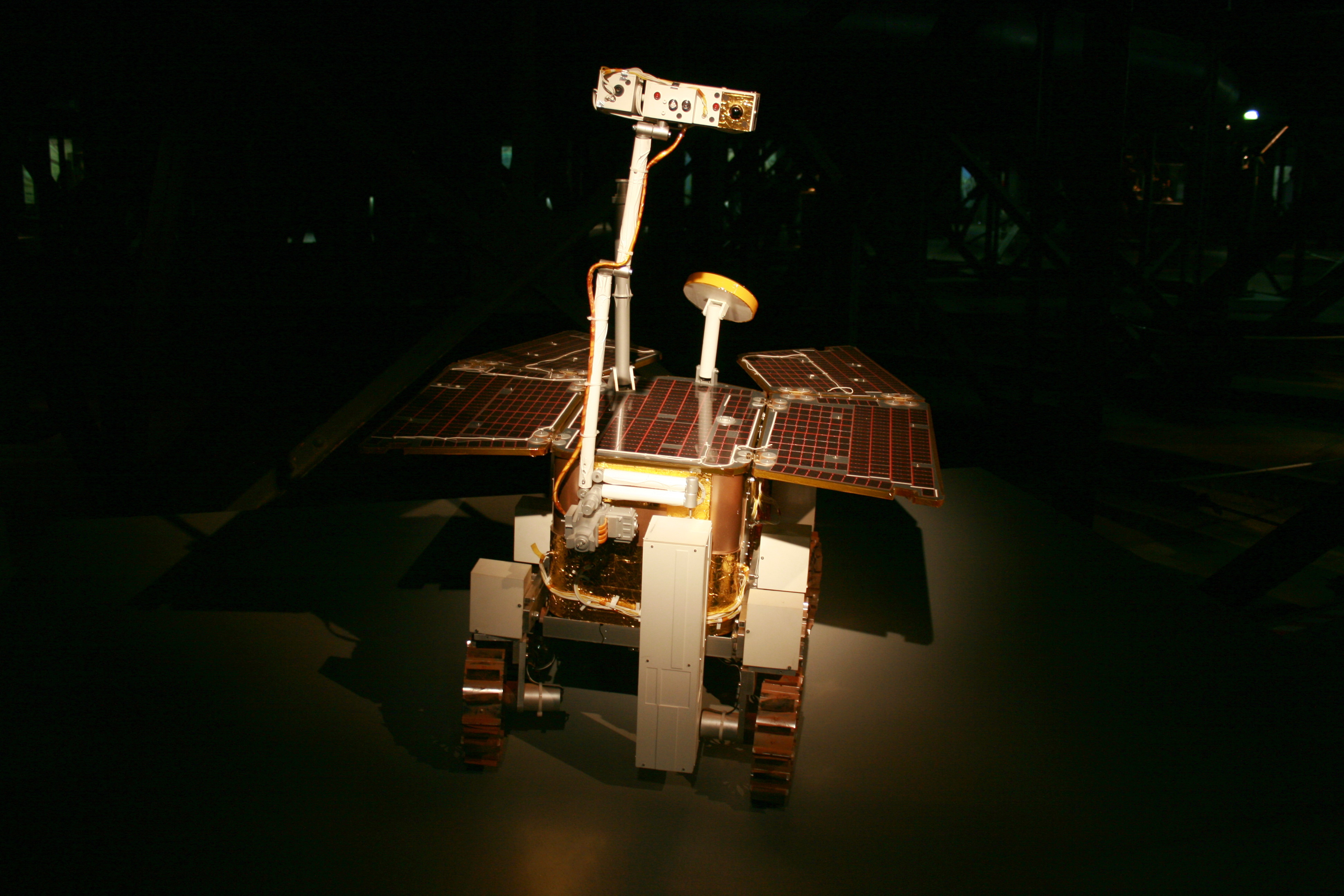 Sternstunden - Wunder des Sonnensystems, Ausstellung im Gasometer Oberhausen